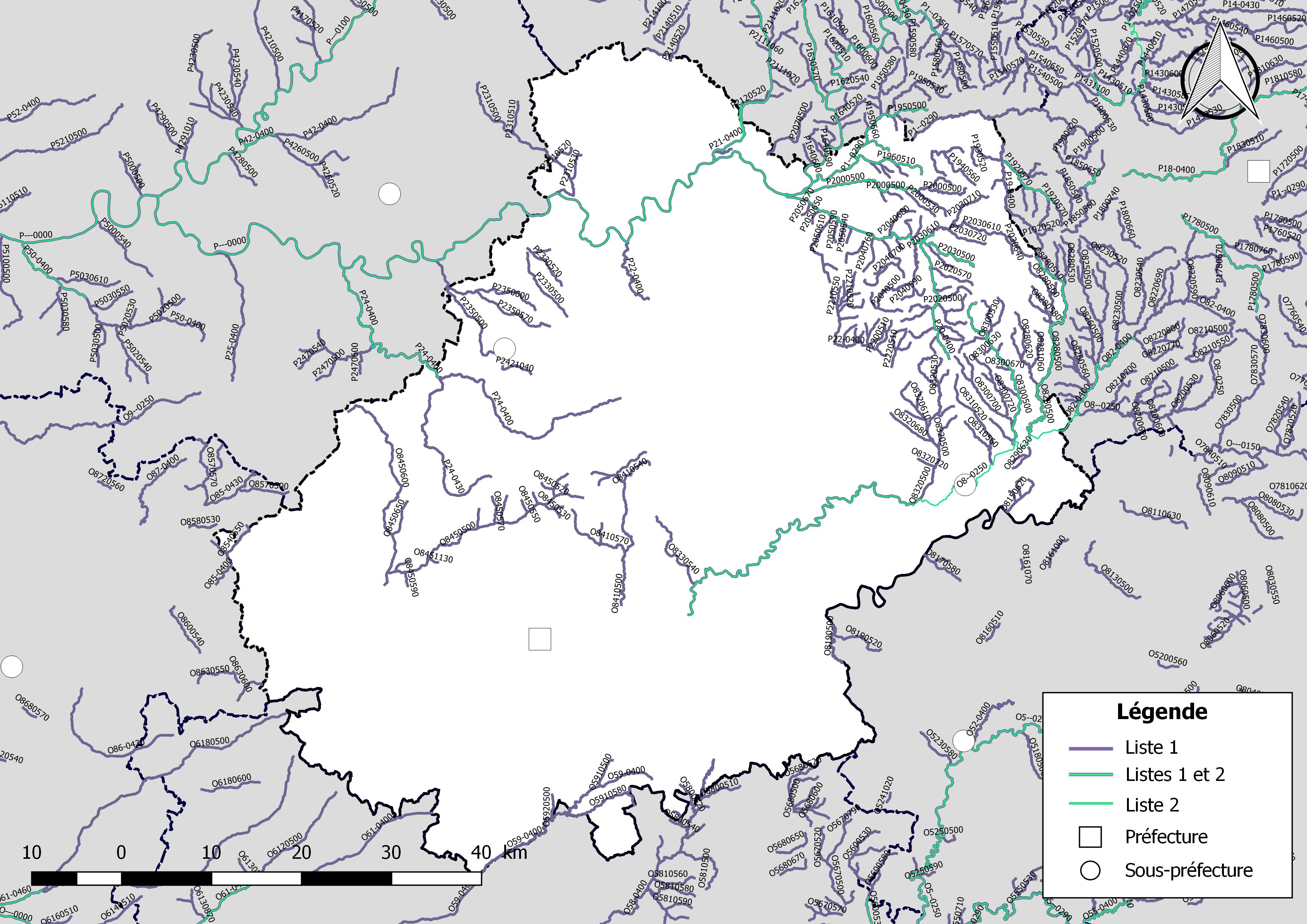 Classement des cours d'eau du département du Lot (France) au titre de la continuité écologique (article L214.17 I du Code de l'environnement).